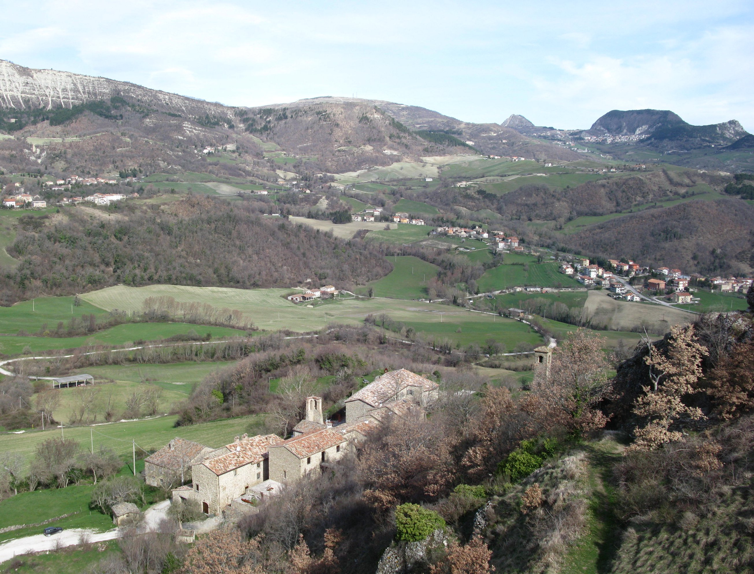 Panorama di Pietrarubbia, provincia di Pesaro e Urbino, Italia.